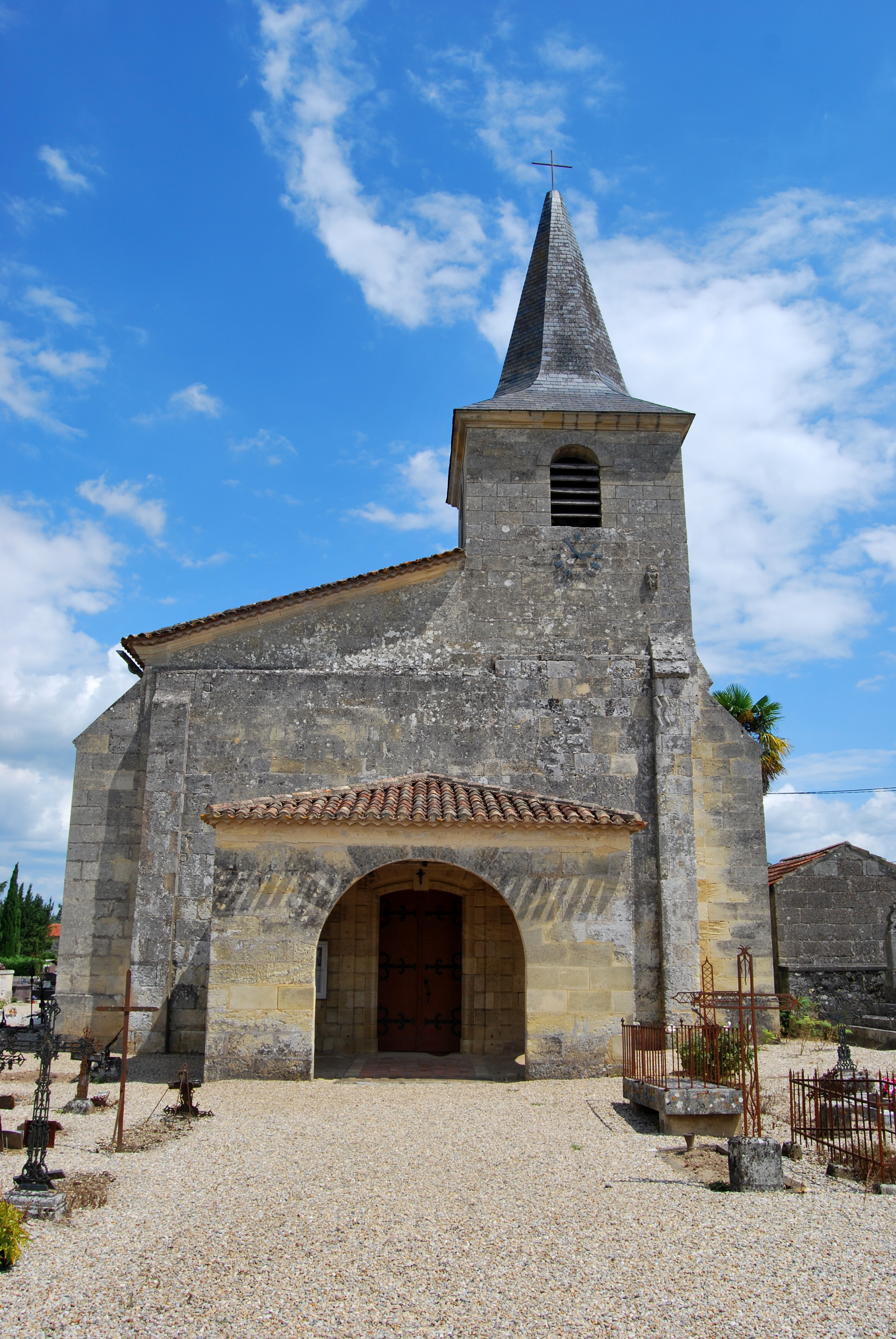 Église Saint-Pierre-aux-Liens de Saint-Pey-d'Armens